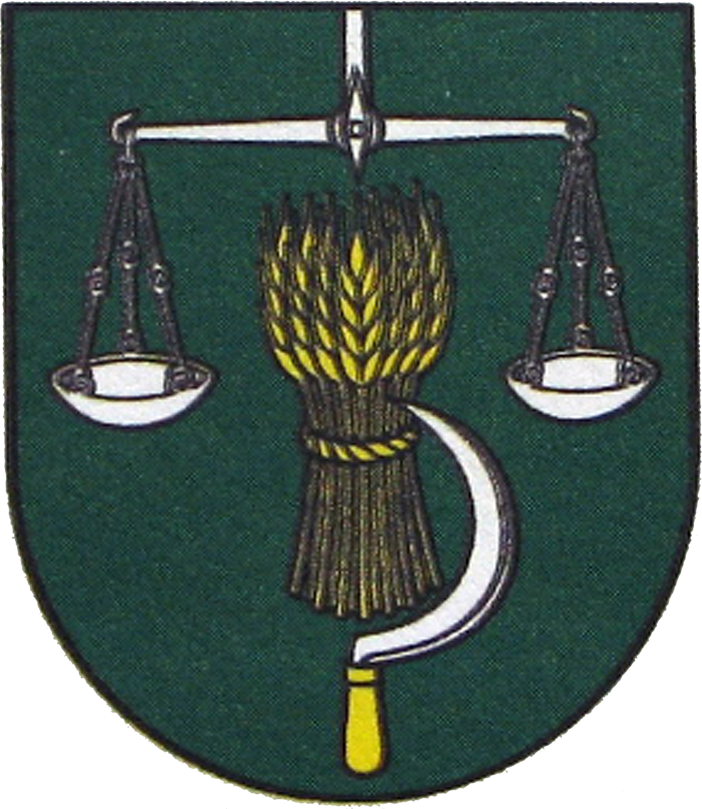 Erb obce Krajná Bystrá (HR: K-227/2004): V zelenom štíte je strieborný kosák so zlatou rukoväťou zabodnutý v zlatom snope.